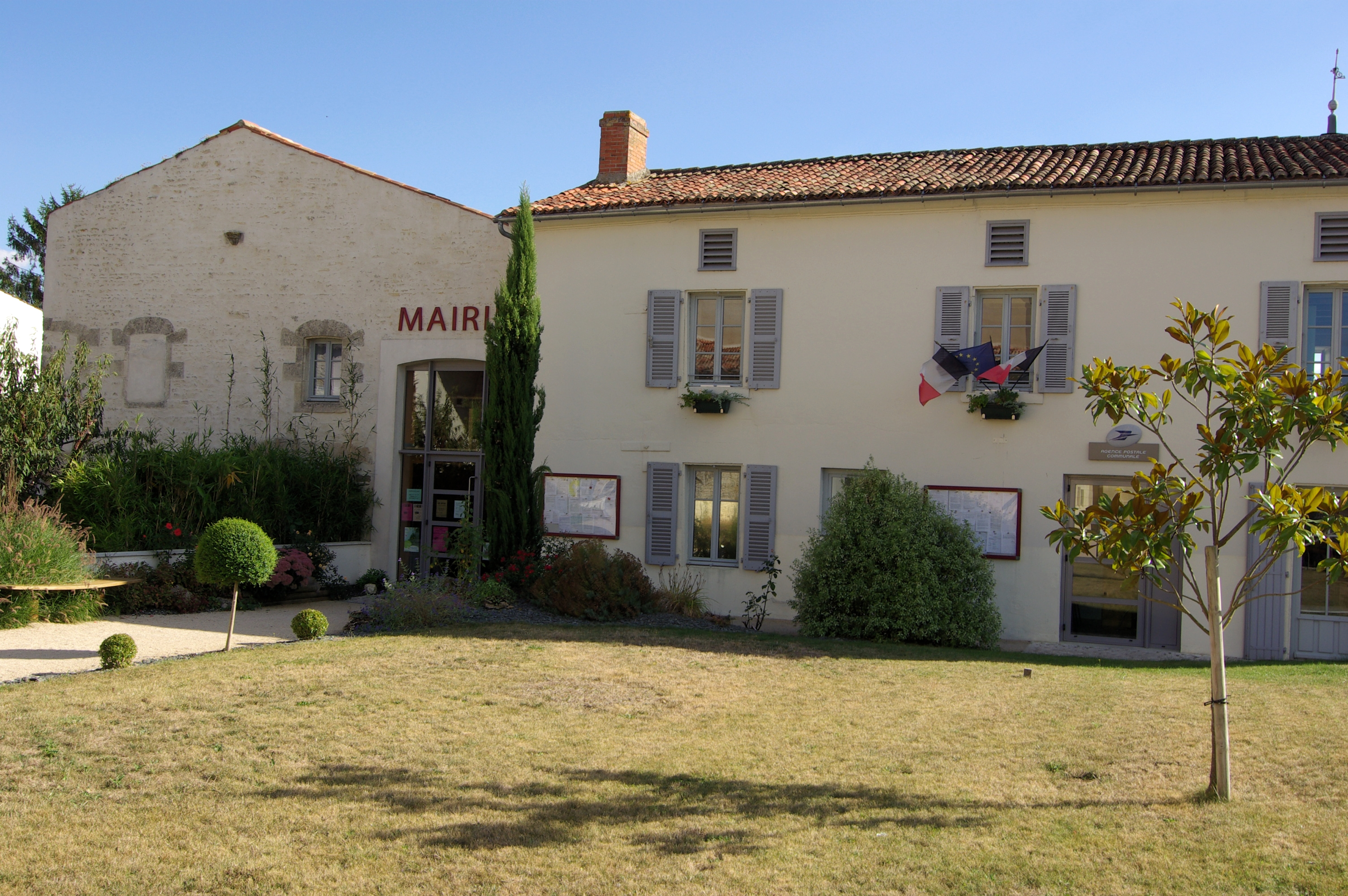 La mairie de Damvix, Vendée.